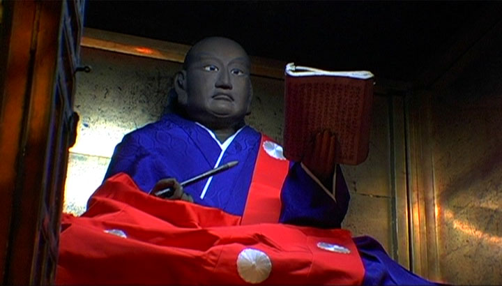 岩本実相寺の御影